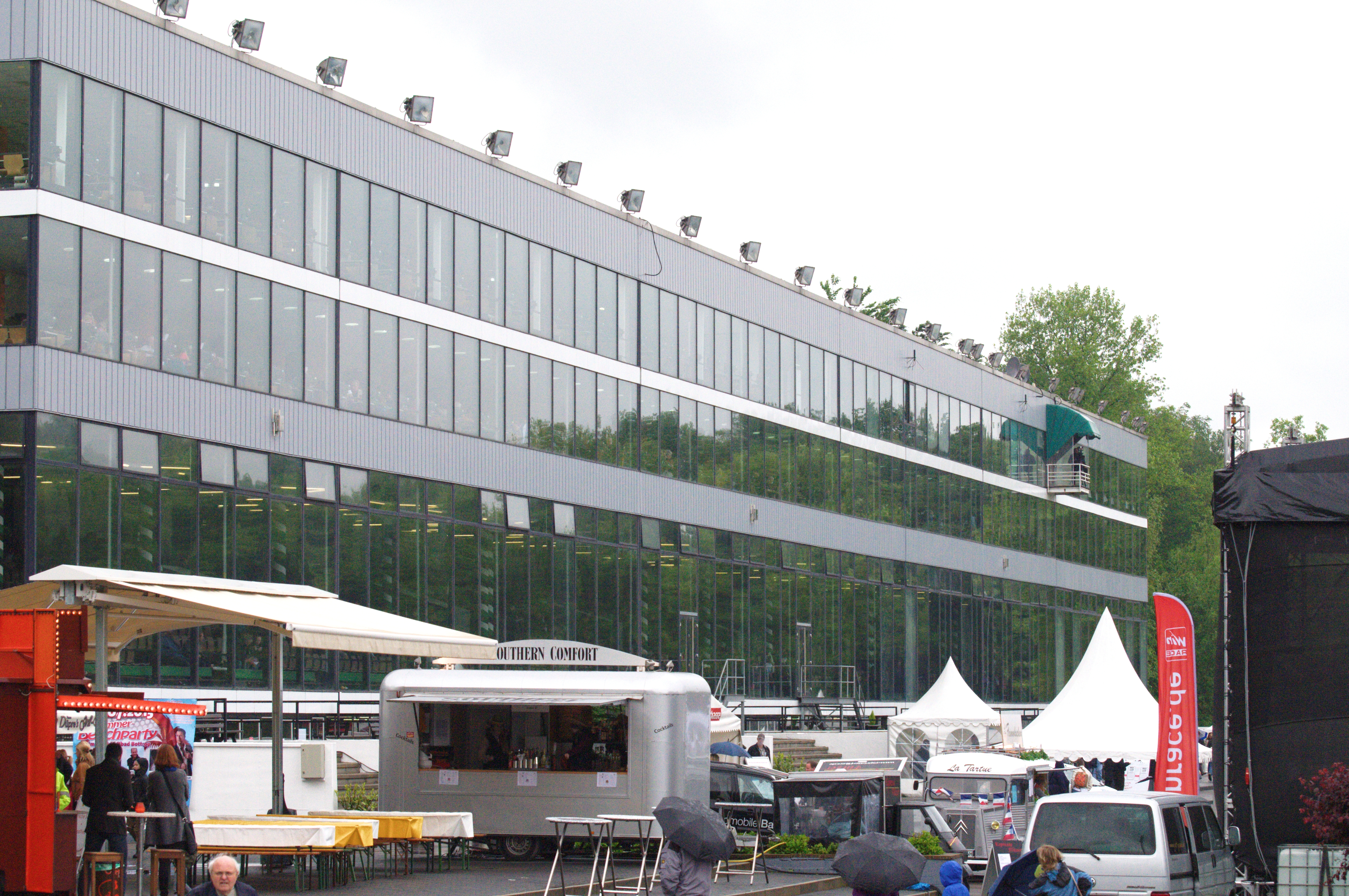 Helden und Helfer-Renntag auf der Trabrennbahn Gelsenkirchen (Gelsentrabpark) am 26. Mai 2013 Tribüne des Gelsentrabparks